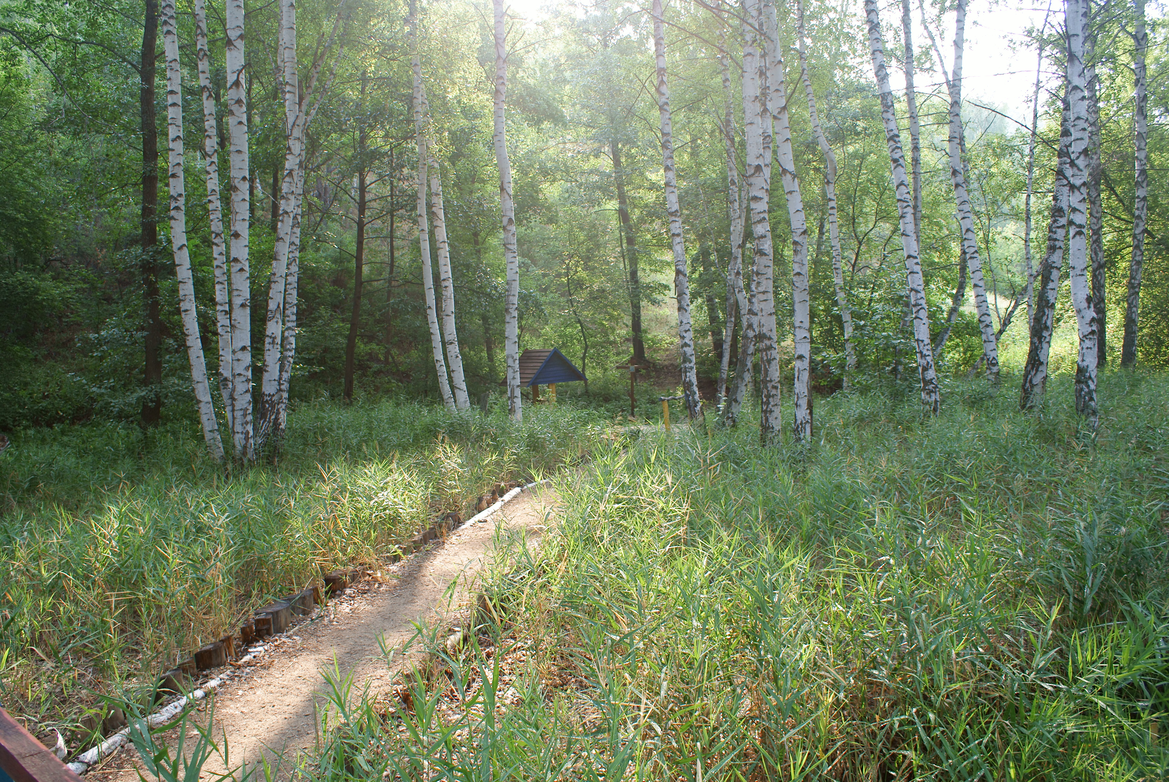 Родник у Кудеяровой горы